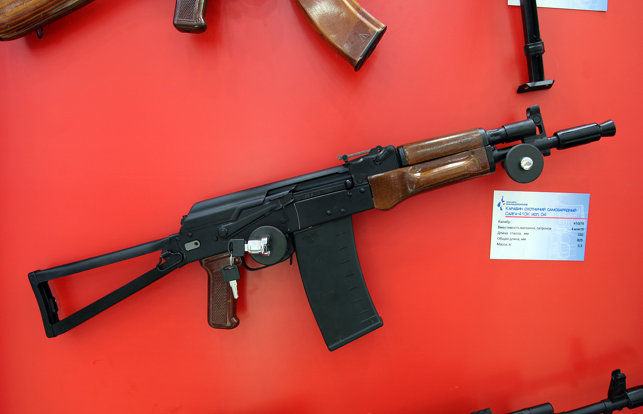 410х76 карабин Сайга-410К исп. 04 (410x76 Saiga-410K-04)